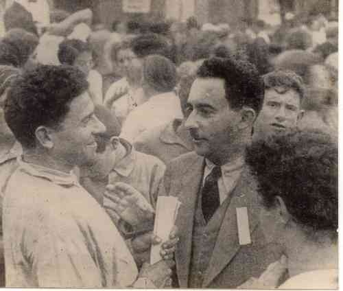 משה שרת ואחיו יהודה בין קהל The brothers Yehuda Sharett & Moshe Sharett משה שרת/ יהודה שרת 8